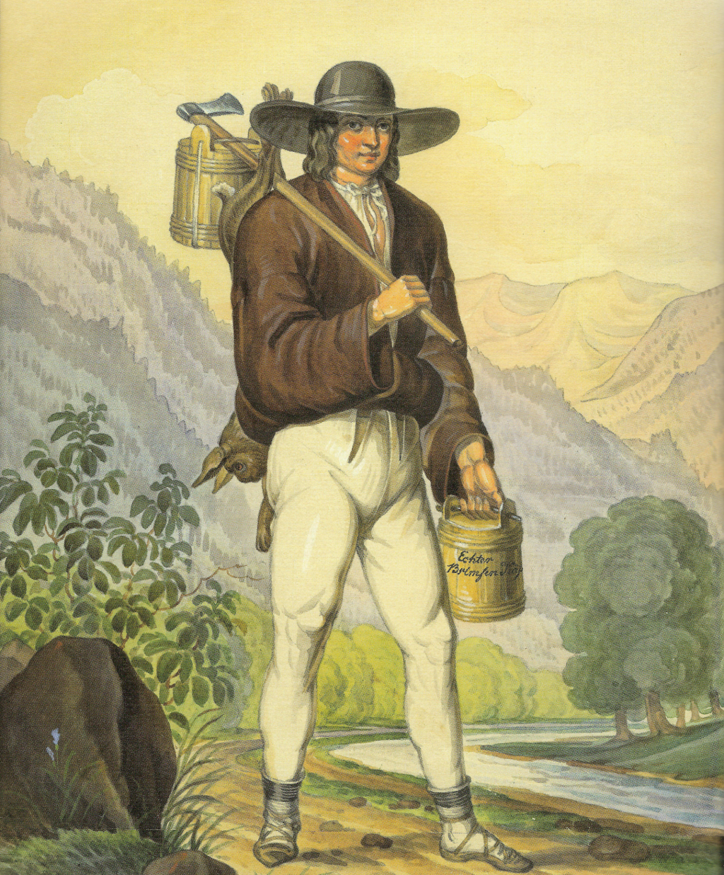 Akwarela Henryka Jastrzembskiego przedstawiająca Górala z Wisły z 1846 roku.